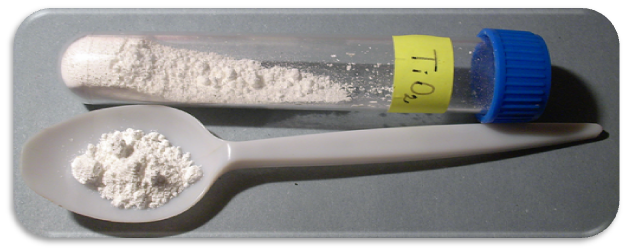 Oxid titaničitý - TiO₂